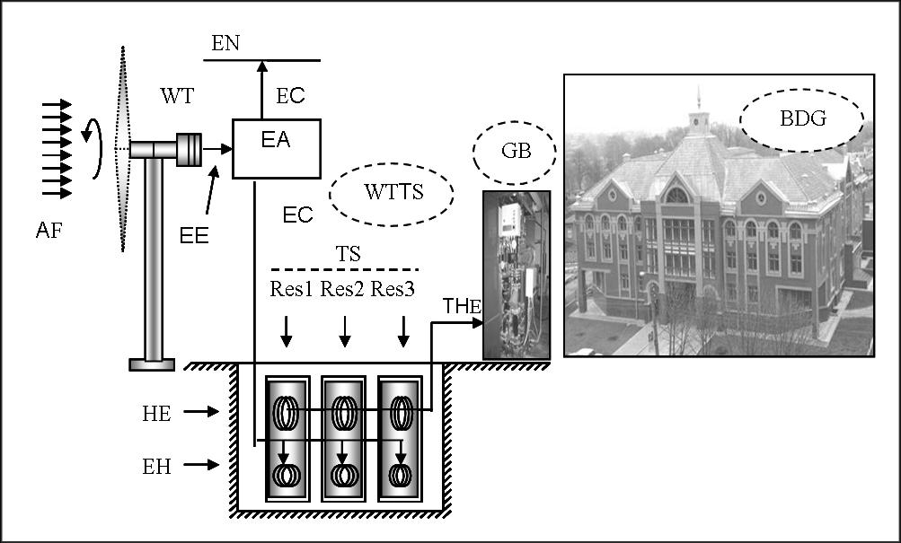 Схема вітрової теплоелектростанції підвищеної потужності, комбінованої з газовим бойлером